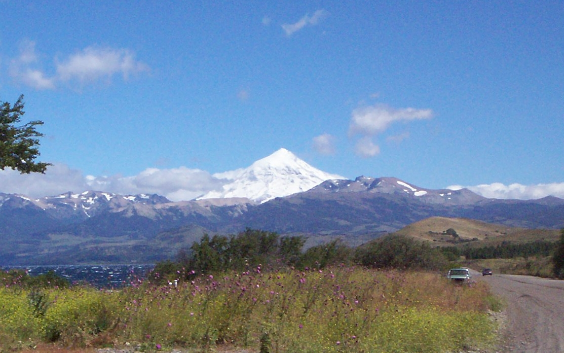 Foto del volcán Lanin (Neuquén, Argentina) tomada desde las inmediaciones del Lago Huechulafquen, el 24 de enero de 2007.